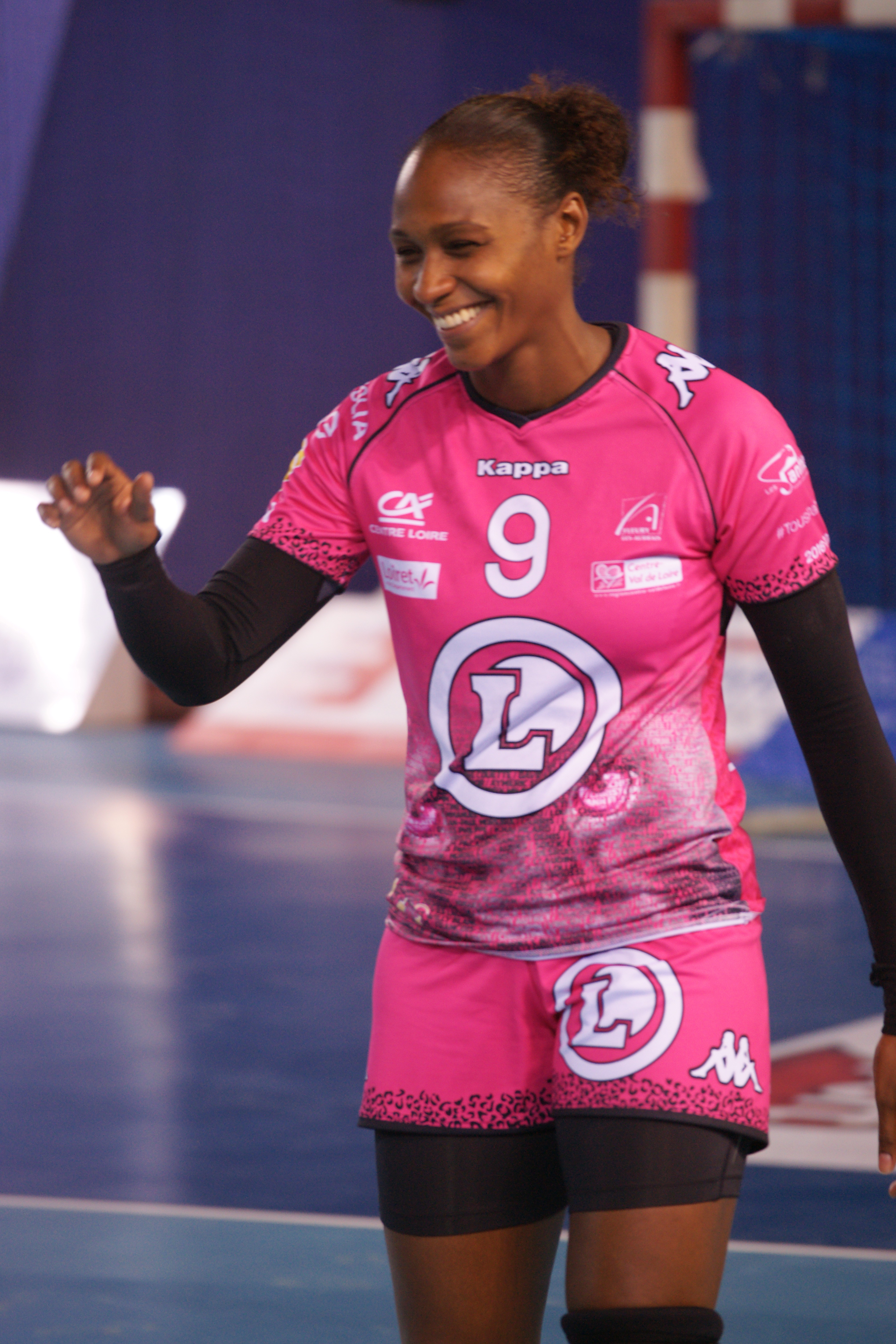 Paule Baudouin, OGC Nice-Fleury 2016